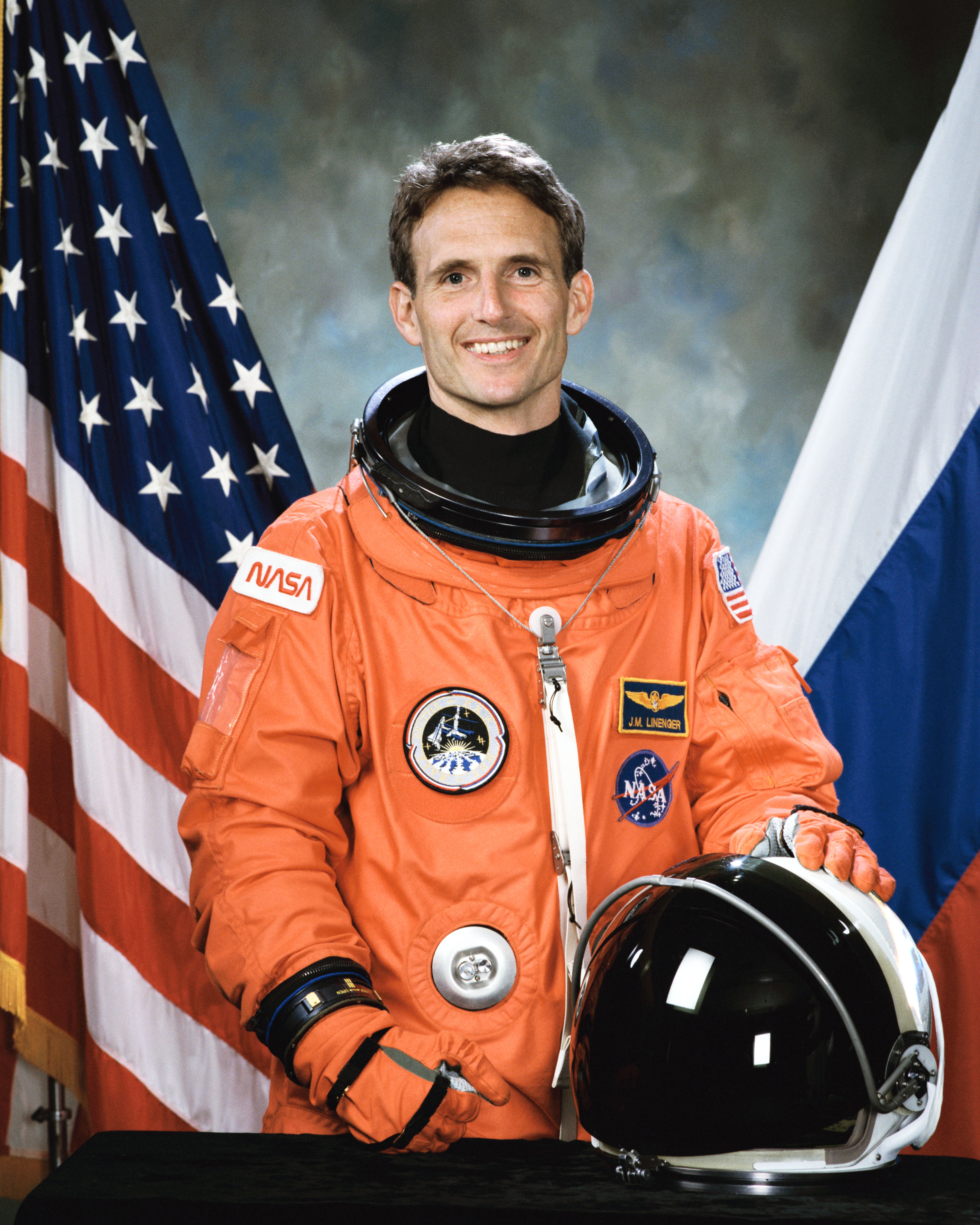 US-Astronaut Jerry Michael Linenger